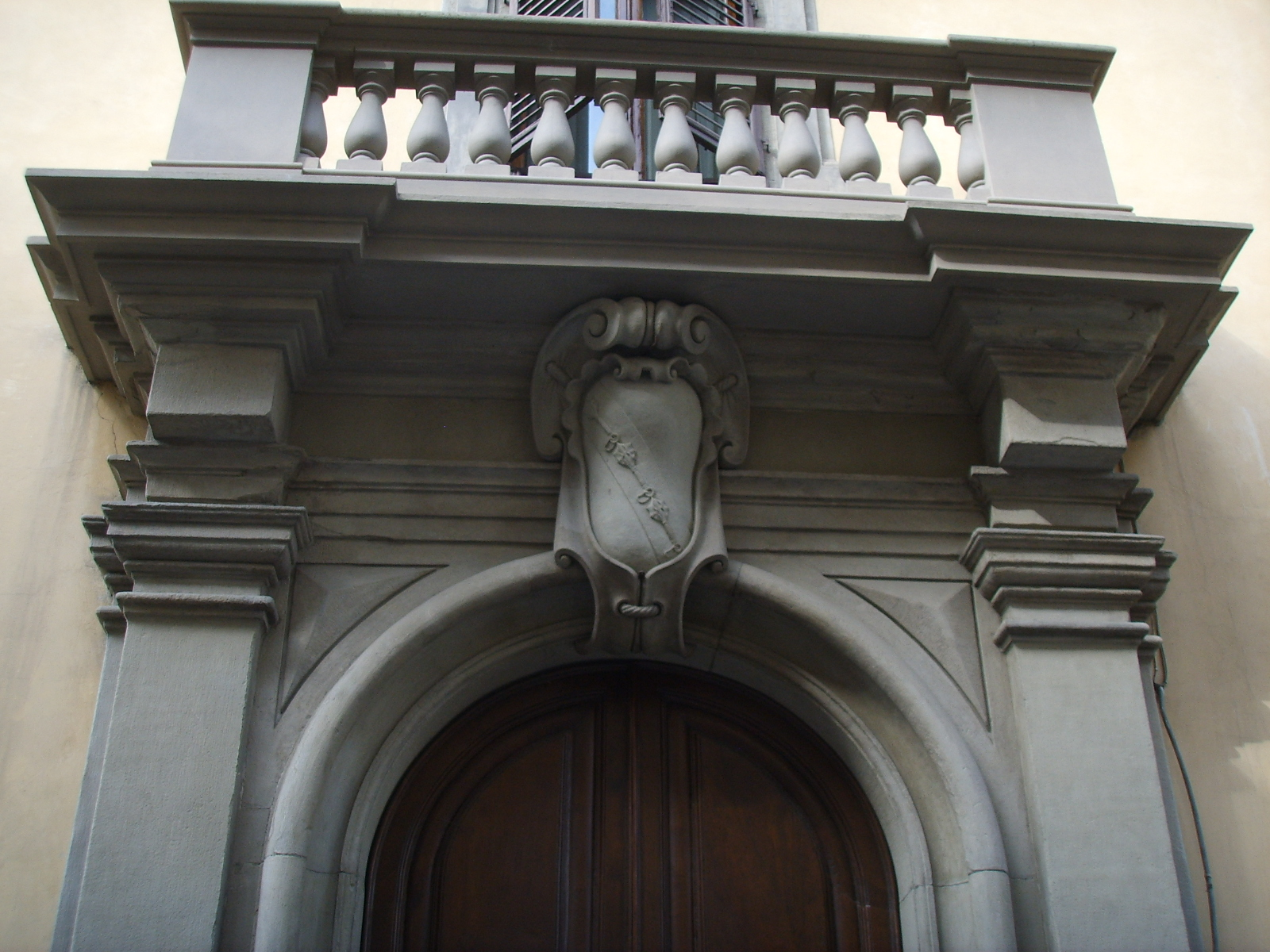 Stemma Mazzei